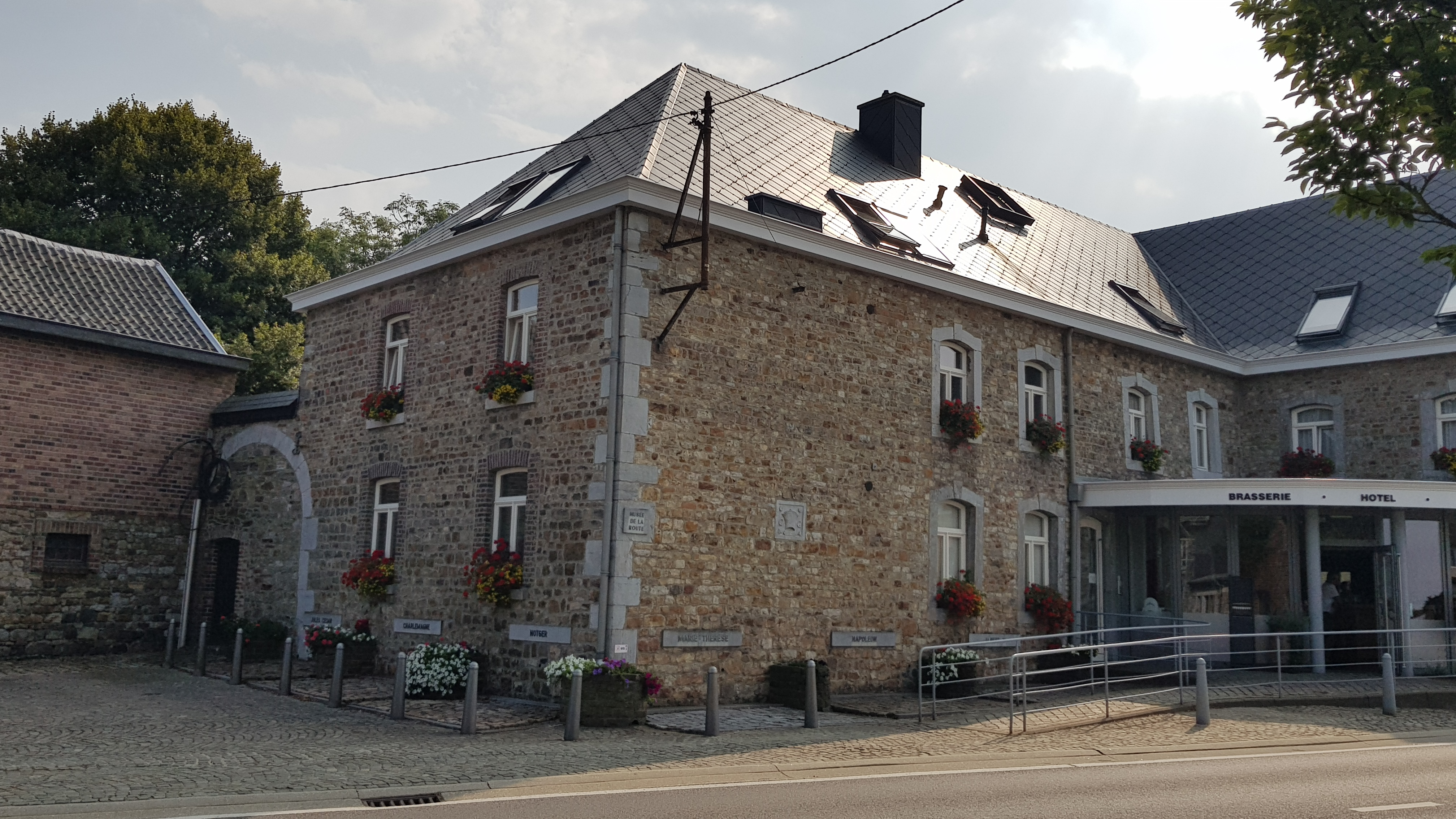 Musée de la Route, Henri-Chapelle, Belgique